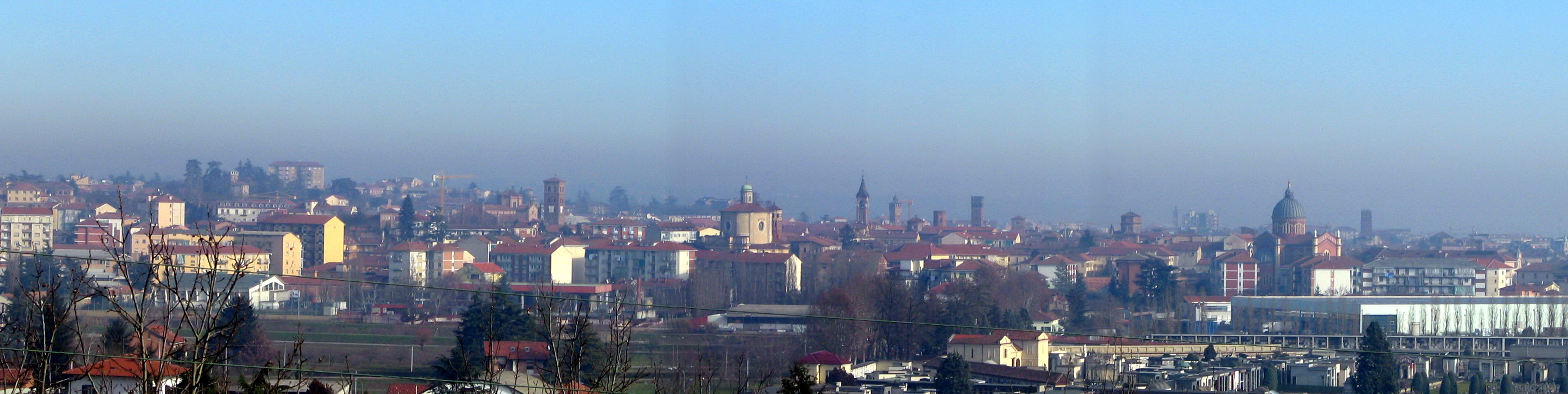 Asti, veduta panoramica della città vista da ovest.